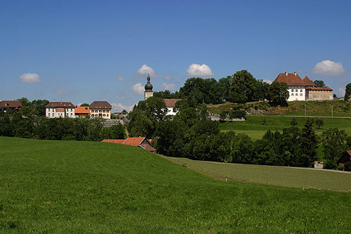 Vaulruz mit Kirche uns Schloss